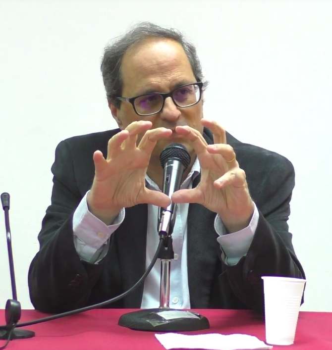 Presentació del llibre: "Els últims 100 metres" de Quim Torra a Valls.